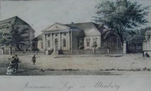 Stahlstich von ca. 1850